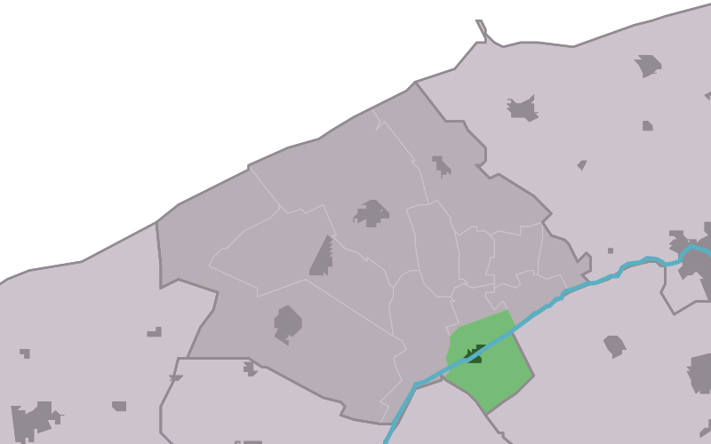 Kaartsje fan himrik fan Burdaard